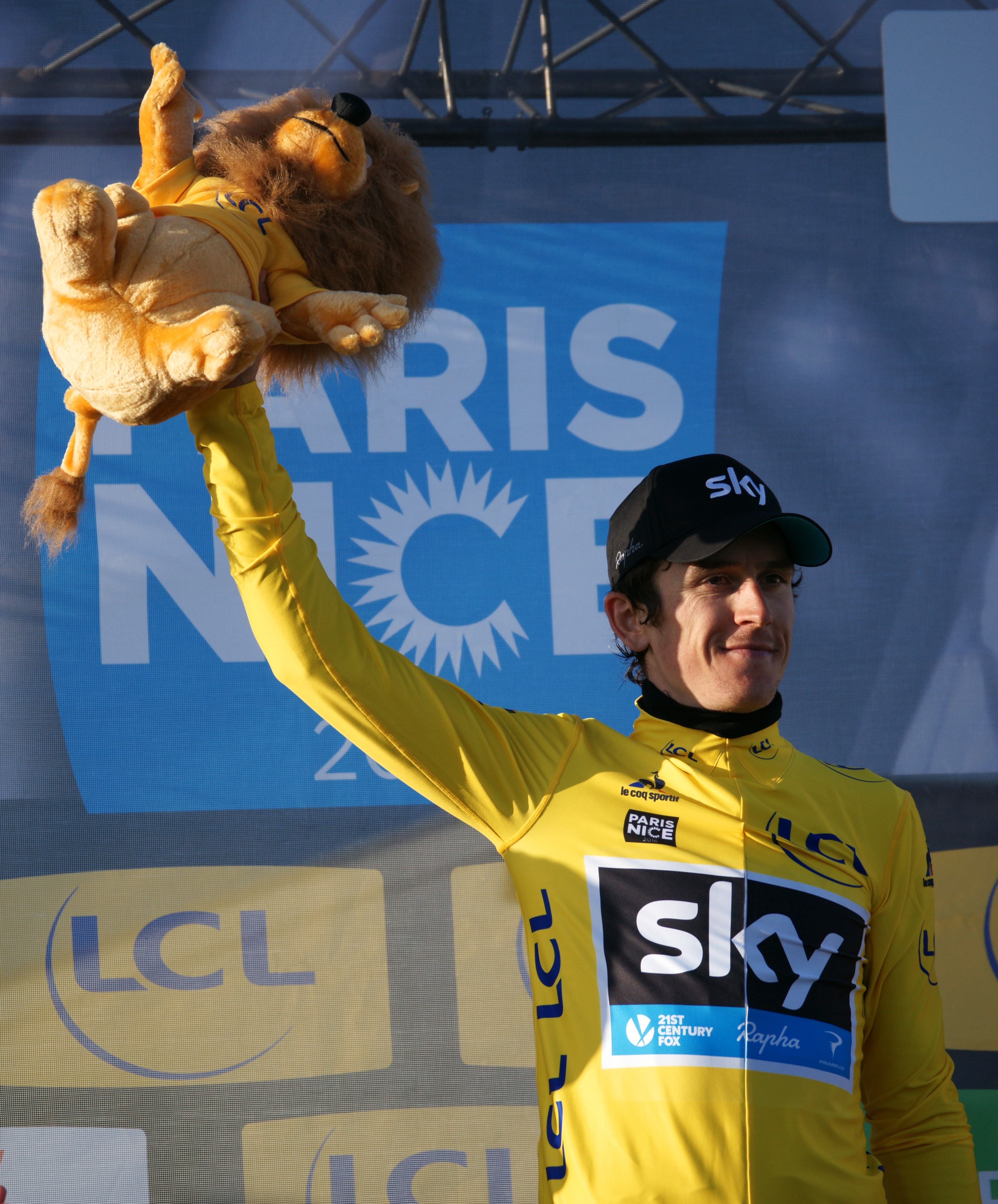 Geraint Thomas jaune Madone d'Utelle 2016 Depicted person: Geraint Thomas Depicted team: Sky